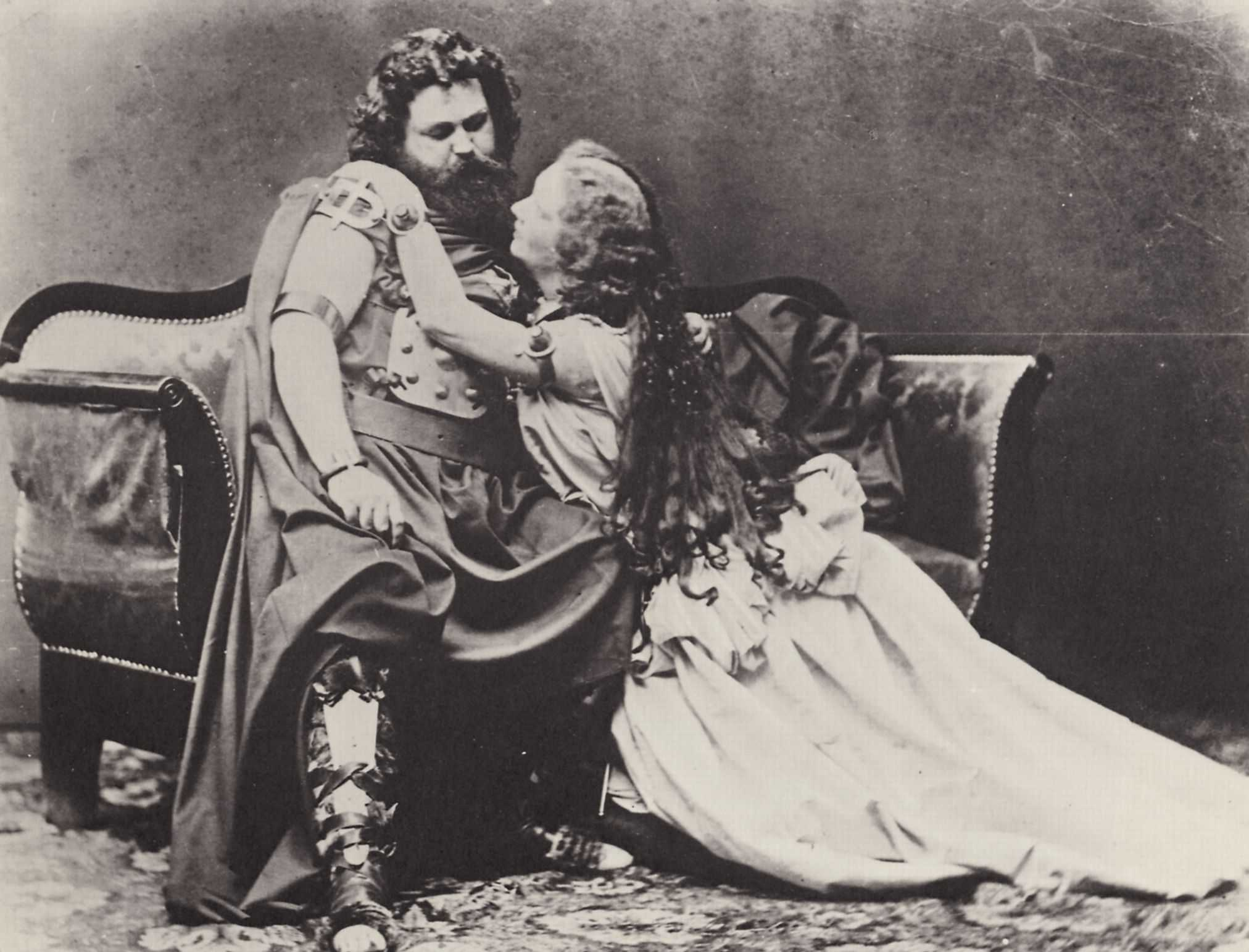 Joseph Albert: Ludwig und Malwine Schnorr von Carolsfeld als »Tristan und Isolde« der Münchner Uraufführung, 1865, München, Staatliche Verwaltung der Schlösser.